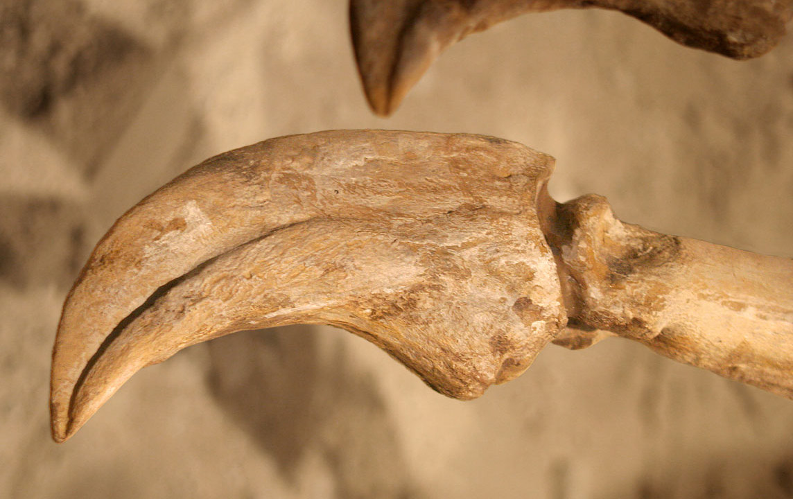 Deinocheirus - 02